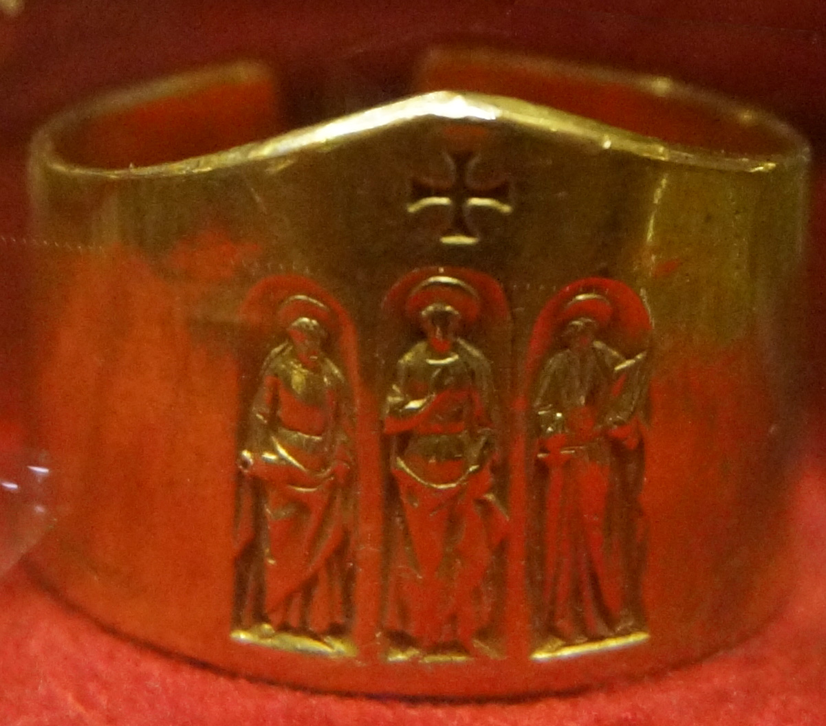 prsénté dans la salle du Trésor, Cathédrale Notre-Dame de Laon.